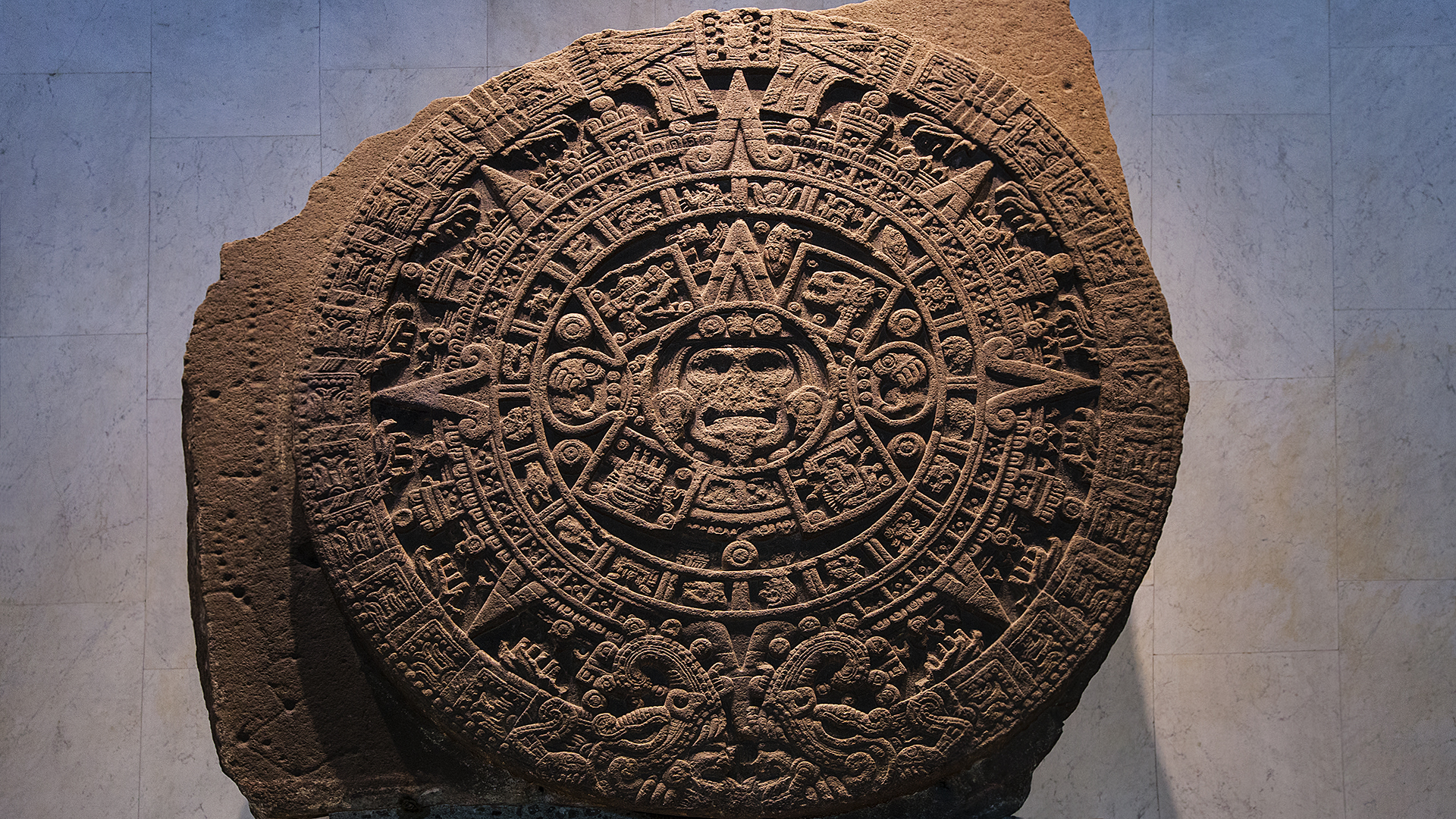 Перейти к: навигация, поиск Камень Солнца также ошибочно называемый ацтекским календарем